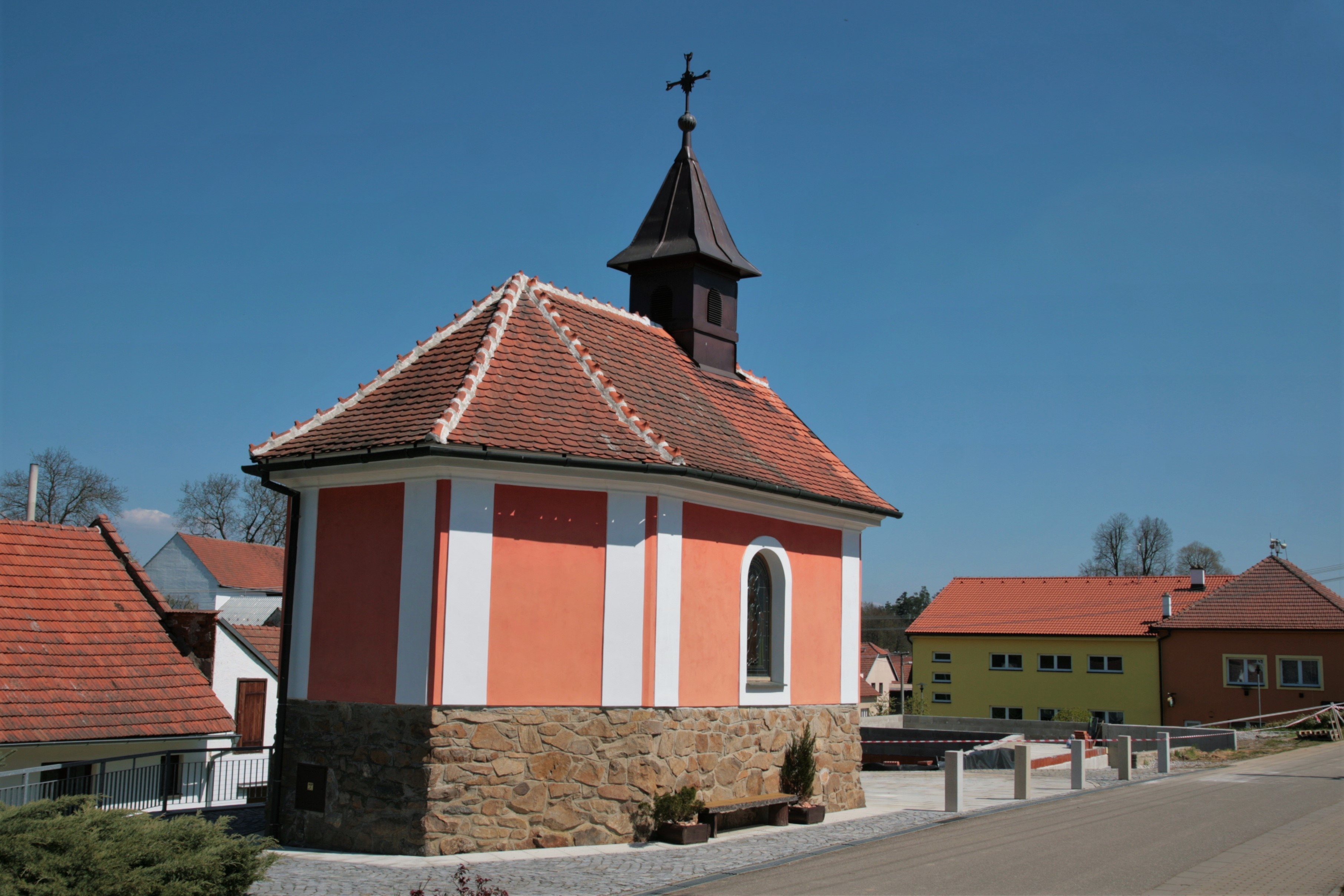 Obec Březské v okrese Žďár nad Sázavou. Rekonstruovaná kaple Nanebevzetí Panny Marie na návsi. Celkový zadní pohled od západu.